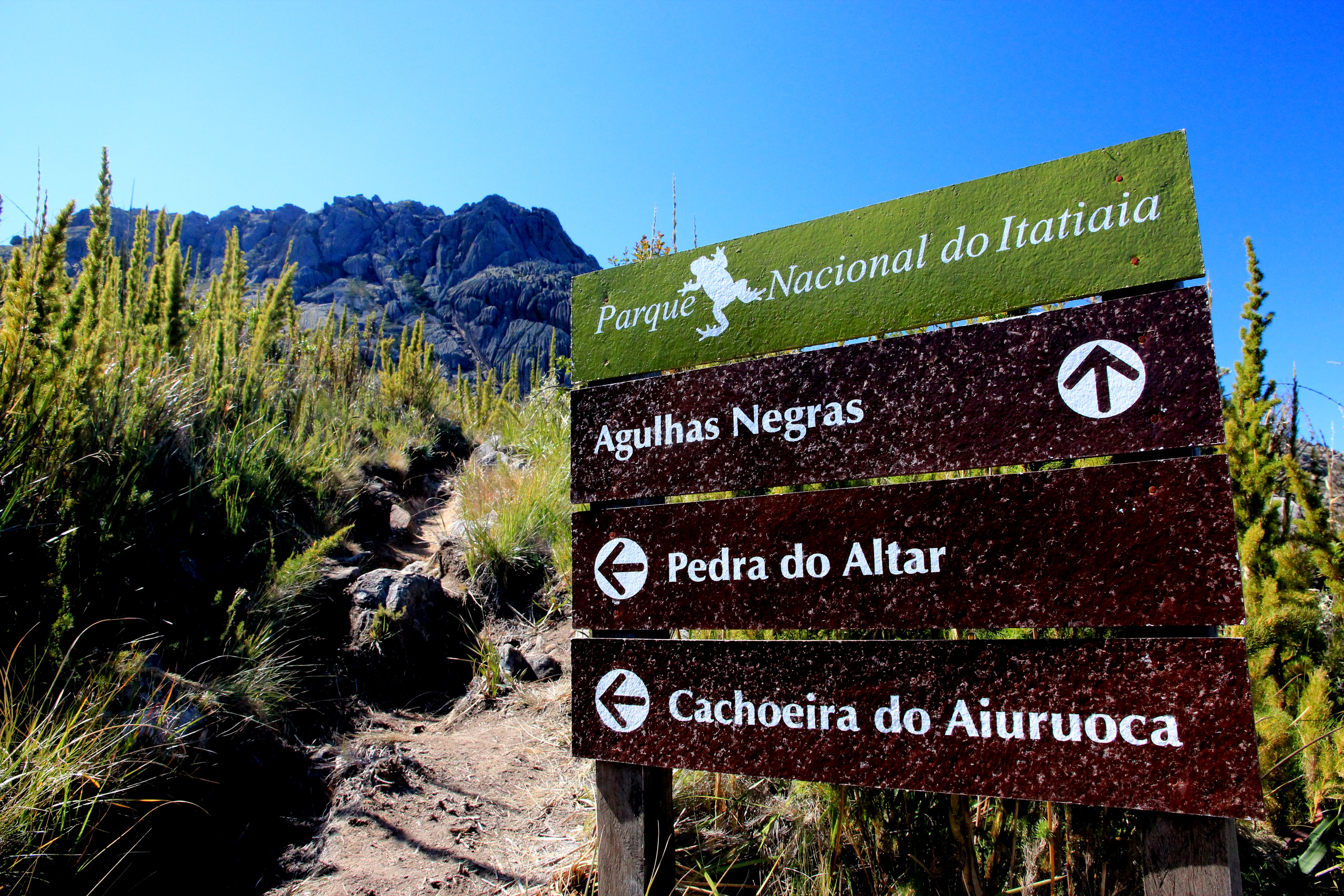 Pico das Agulhas Negras no Parque Nacional do Itatiaia, Rio de Janeiro. por Henrique Boney